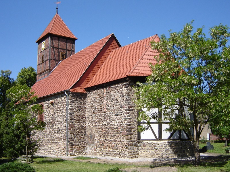 Rietzel, Sachsen-Anhalt, Kirche